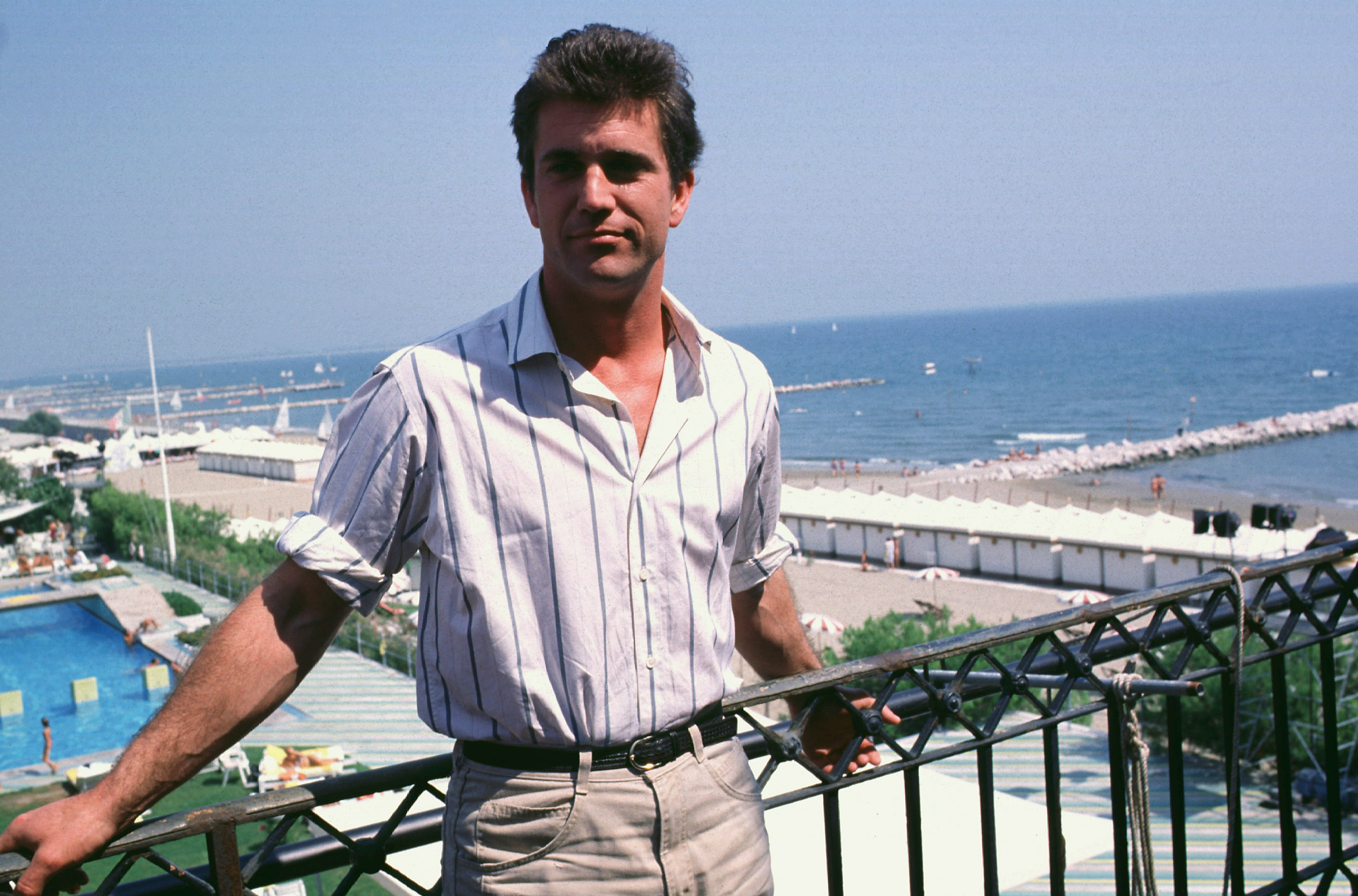 L'attore Mel Gibson alla Mostra del cinema di Venezia del 1985